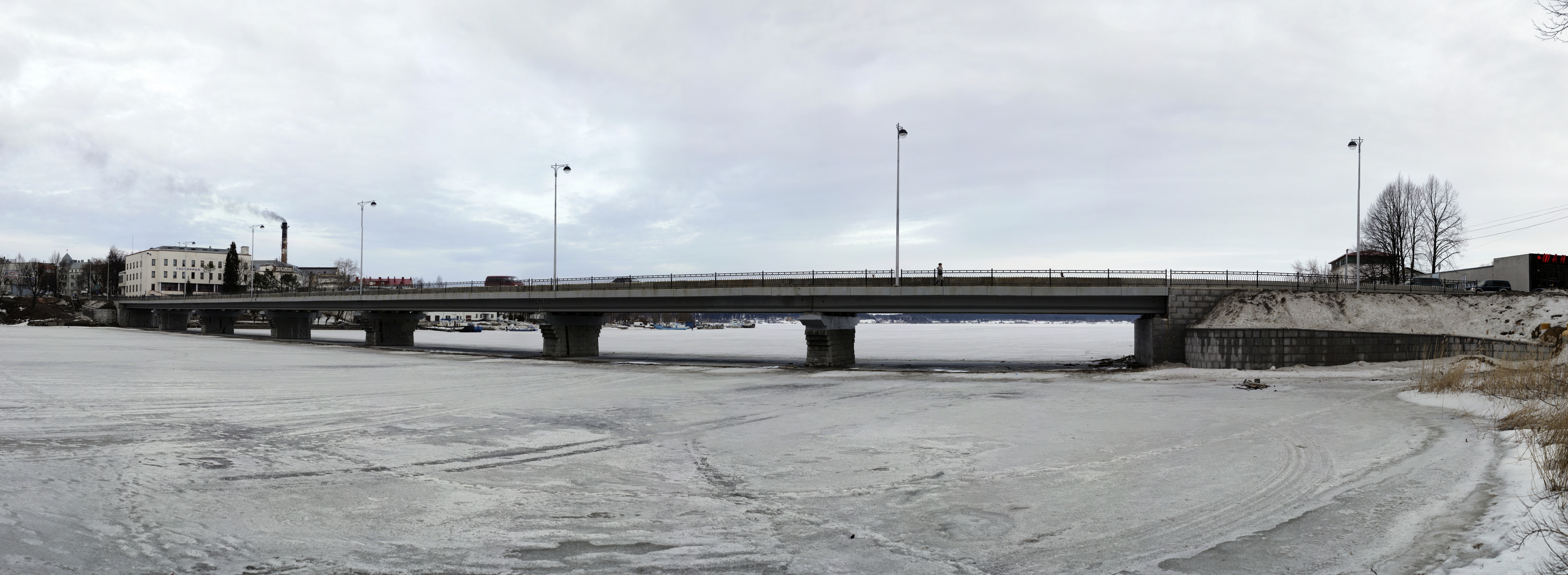 Мост в городе Сортавала. Соединяет две части города через залив.